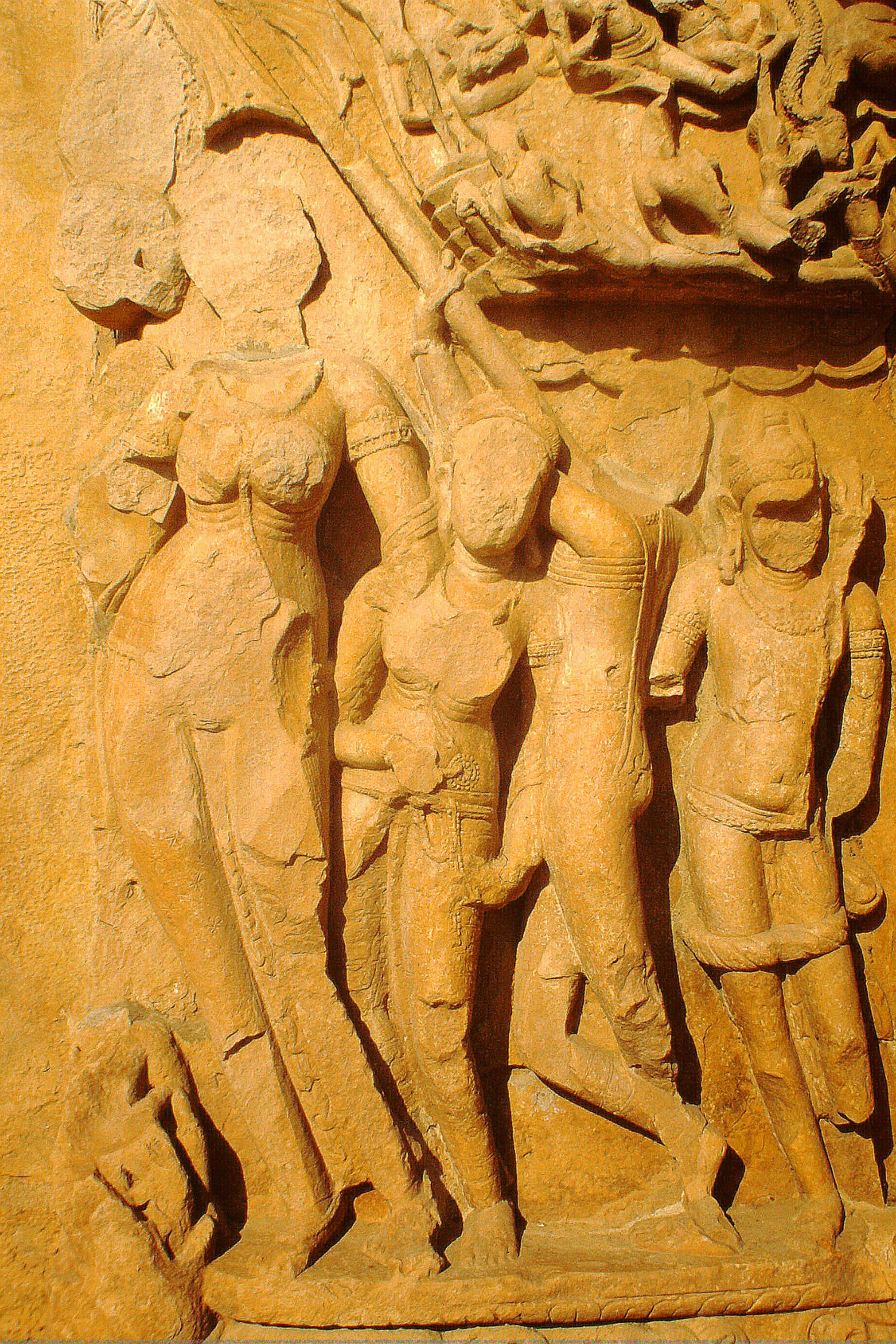 Gwalior, Teli-ka-Mandir, Yamuna